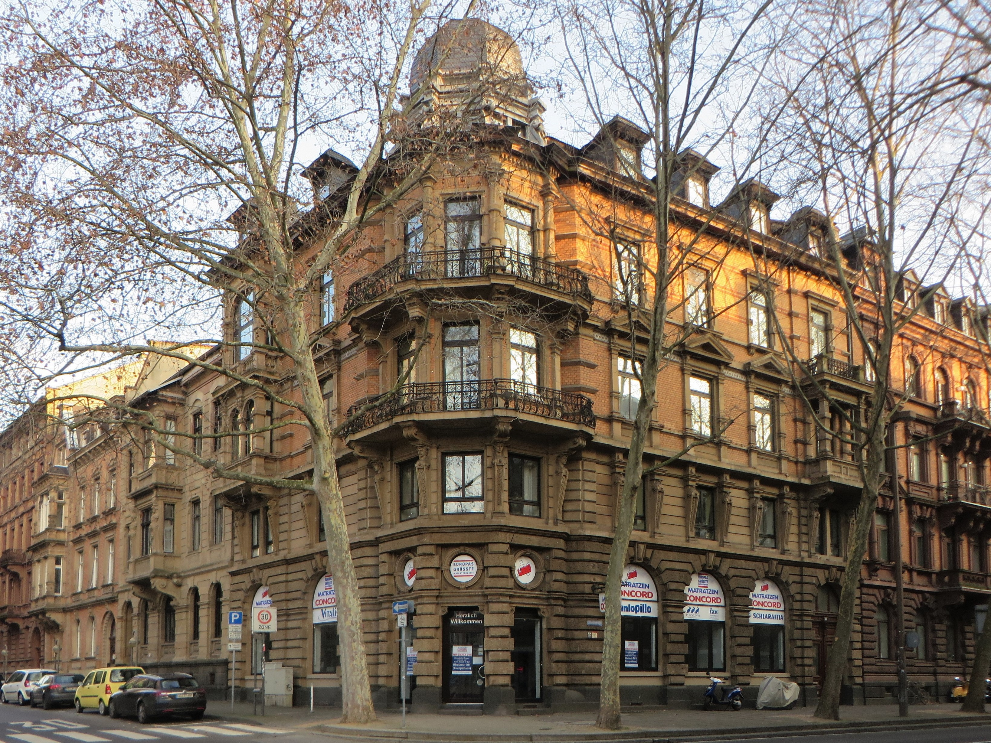 Rheinstraße 48, 55116 Mainz